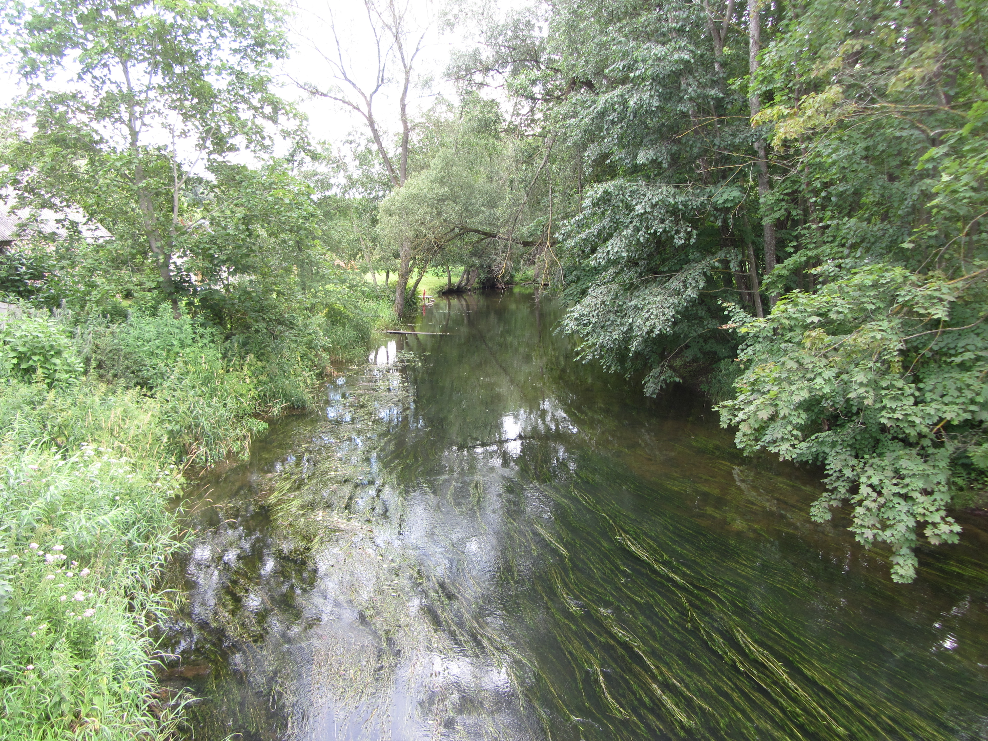 Antalieptė, Lithuania